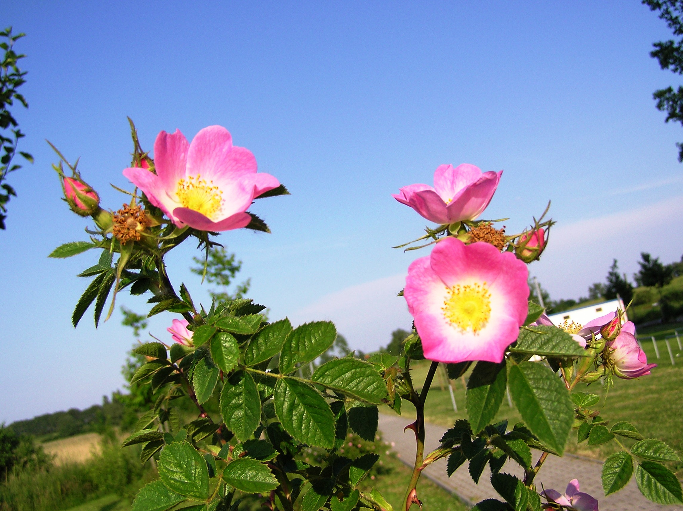 Rosa rubiginosa mit einigen Knospen, fotografiert in Barth